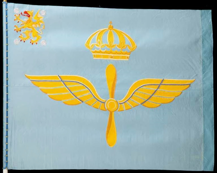 Förbandsfana för Östgöta flygflottilj (F 3) åren 1938-1974. Senare överförd till Bråvalla flygflottilj (F 13) åren 1974-1994. Återlämnad till Armémuseum. Fanduk är av mycket ljust blått siden. Motivet består av en propeller med två vingar runtomkring, krönt av en kunglig krona. Motivet är handbroderat. I övre inre hörnet finns en drake med tunga, näbb och klor. Draken är broderad i fyra gula nyanser och de röda detaljerna är även de i flera nyanser. I varje hörn är en vit-grå ros broderad. Fanan är utförd i utsökt vackert handarbete vid Heraldisk konst, Kedja 1938, enligt märkning på duken. Duken är mycket blekt.